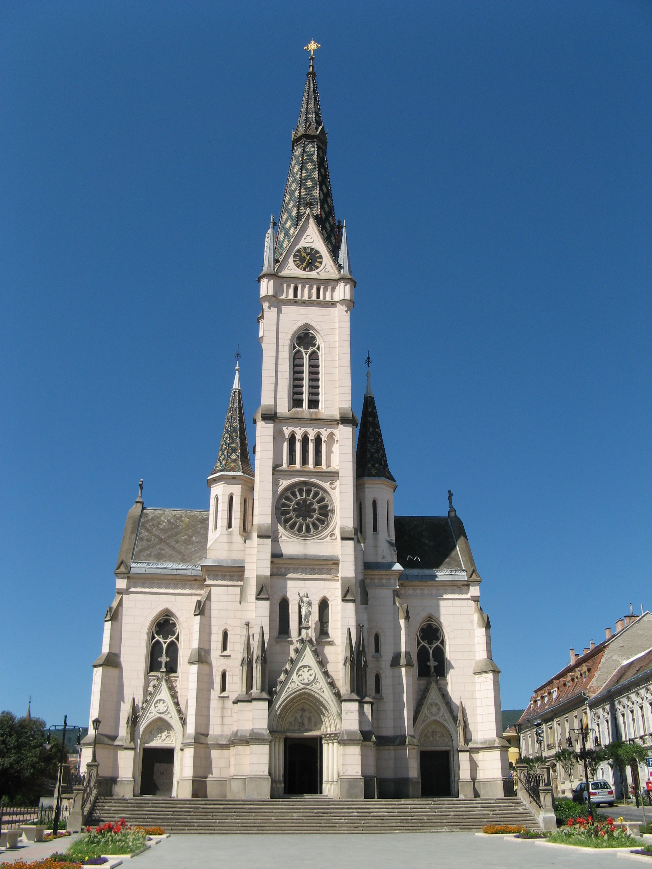 Kőszeg Church